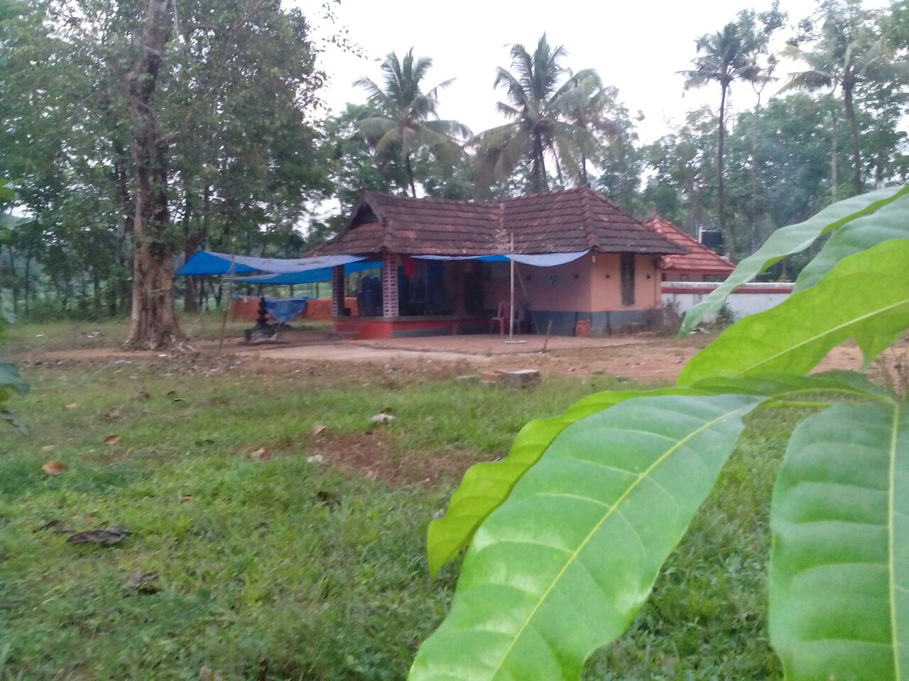 elangavathu kavu is a bhadrakali temple. situated near varappetty, moovatupuzha, Ernakulam dist, kerala india.